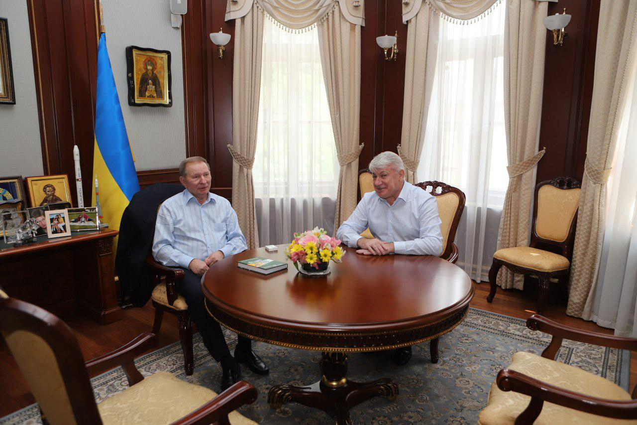 Василь Вовк під час проведення консультацій з Леонідом Кучмою під час призначення останнього головою української делегації у Тристоронній контактній групі в Мінську